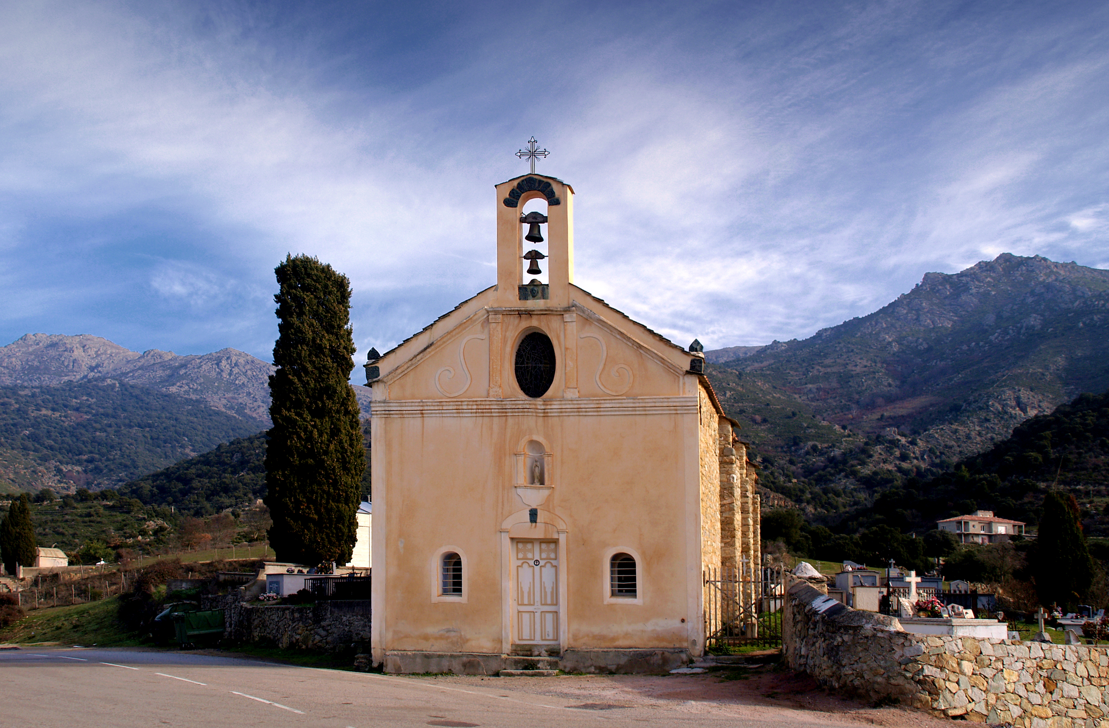 Pietralba (Corsica) - Chapelle Sainta Maria